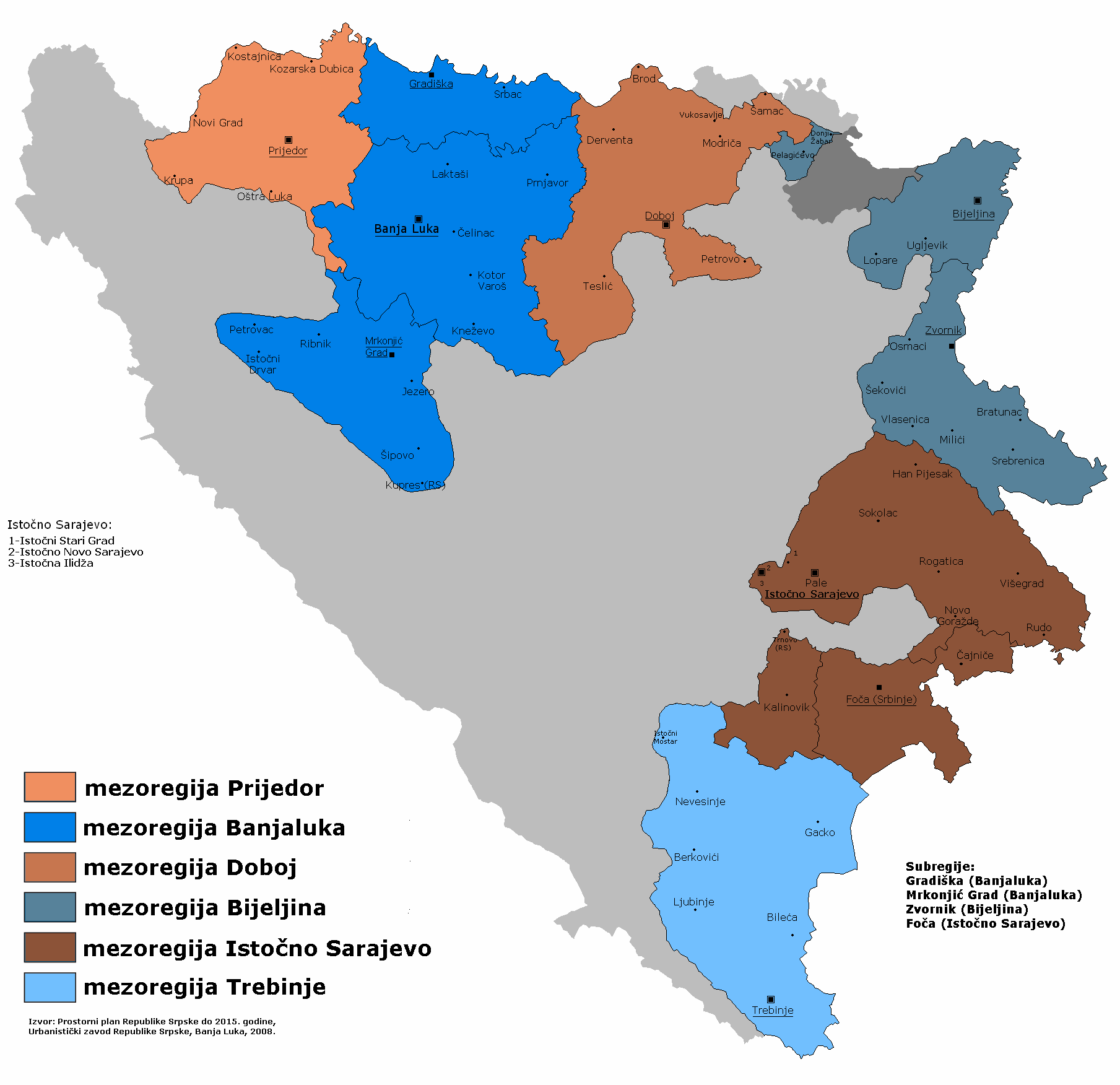 Новые регионы (мезорегионы) Республики Сербской по тер. плану до 2015 года